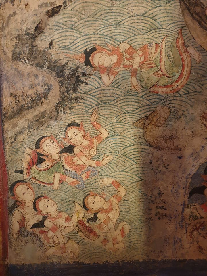 เงือกน้ำ(เงือกชนิดมีขา) ที่มา ภาพจิตรกรรมเรื่อง สุวรรณหงส์ วิหารลายคำ วัดพระสิงห์ อำเภอเมือง จังหวัดเชียงใหม่